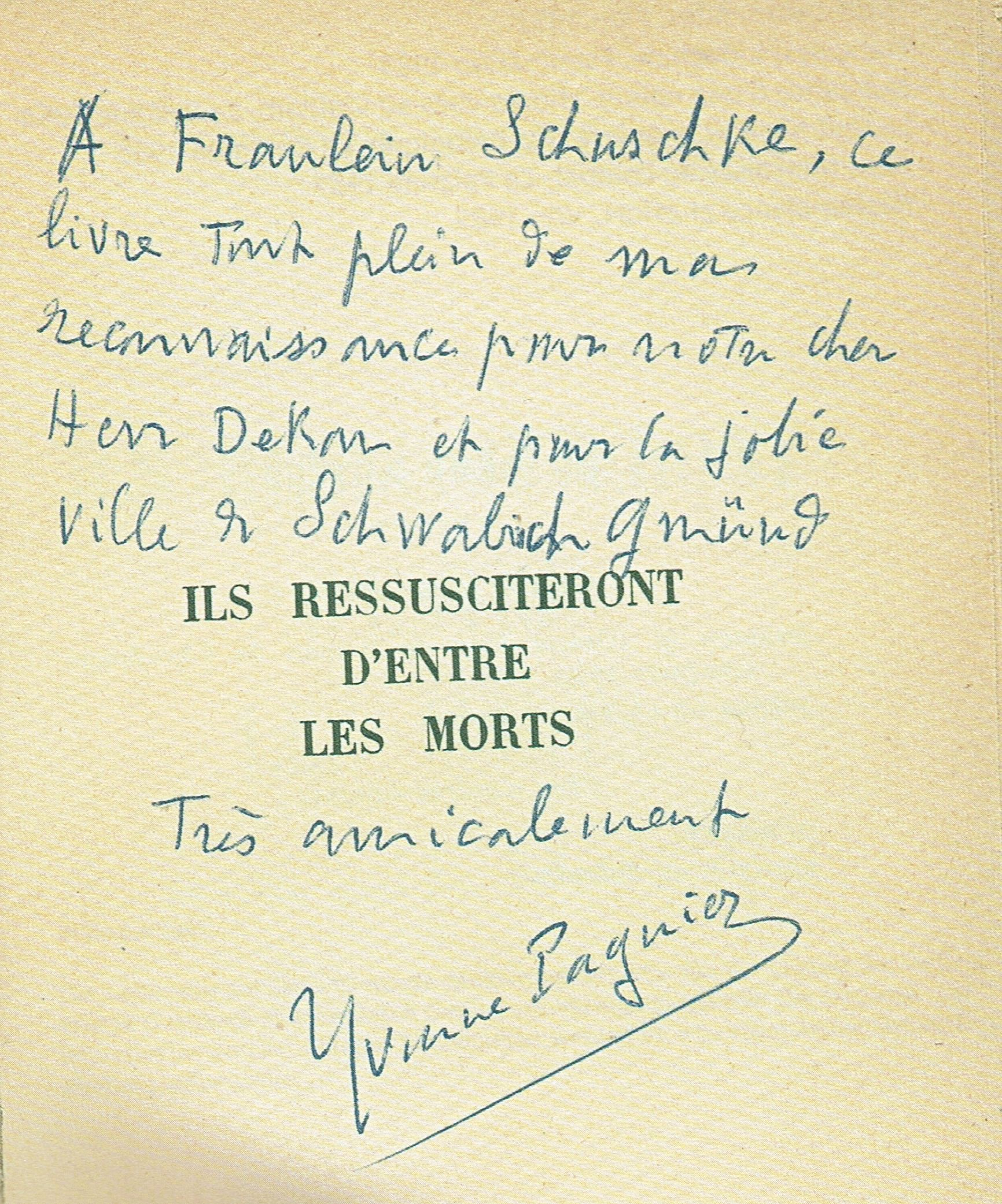 Widmung von Yvonne Pagniez ihres Buchs Ils ressusciteront d'entre les morts, 1949 an die Schwäbisch Gmünder Pfarramtssekretärin Hedwig Schuschka